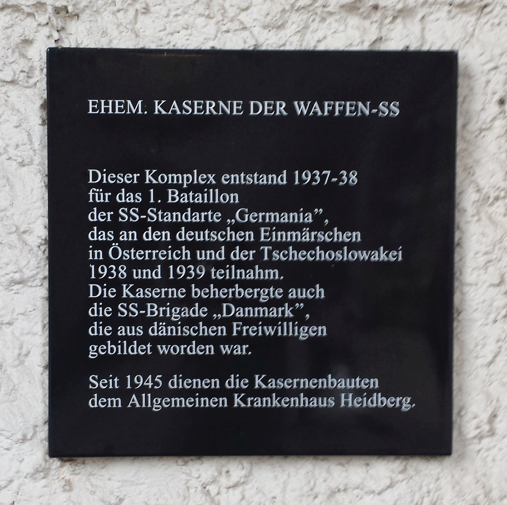 Gedenktafel an die SS-Kaserne im Heidberg-Krankenhaus Hamburg-Langenhorn